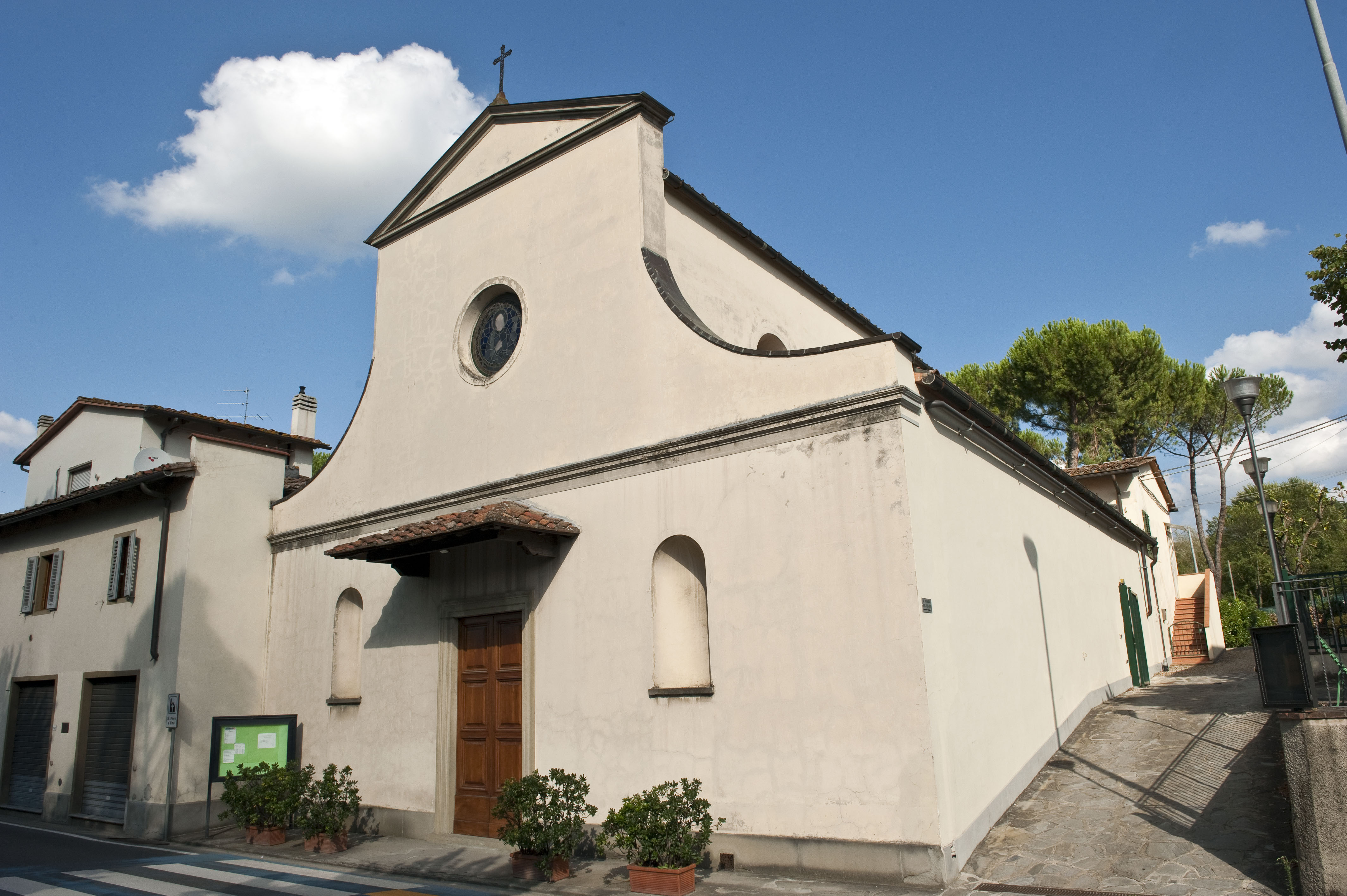 Chiesa di San Pietro a Ema (Ponte a Ema, Bagno a Ripoli)